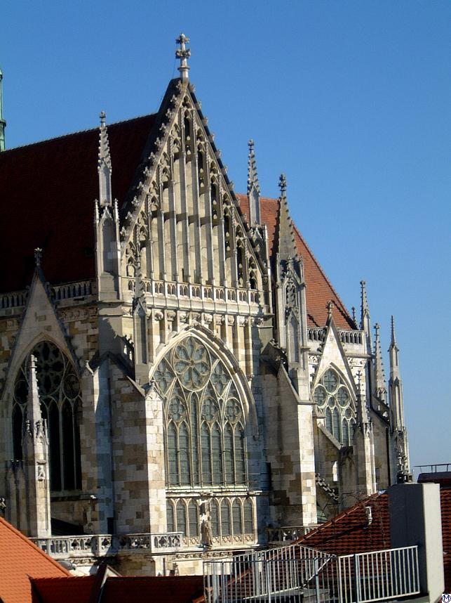 Fenster am Querschiff im Regensburger Dom